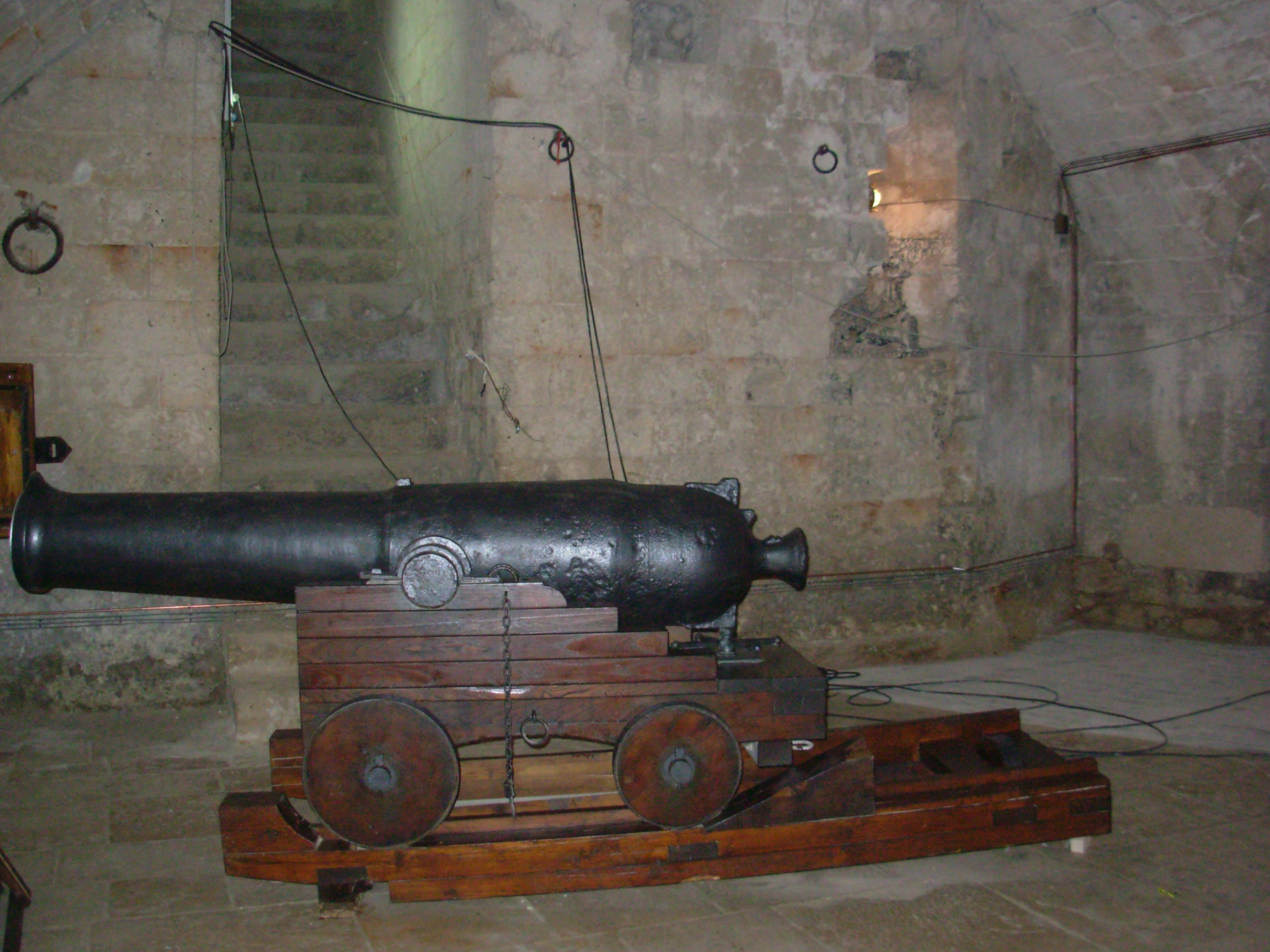 Cannone a canna liscia completo di affusto di brandeggio e puntamento (1840); Castello Carlo V di Monopoli